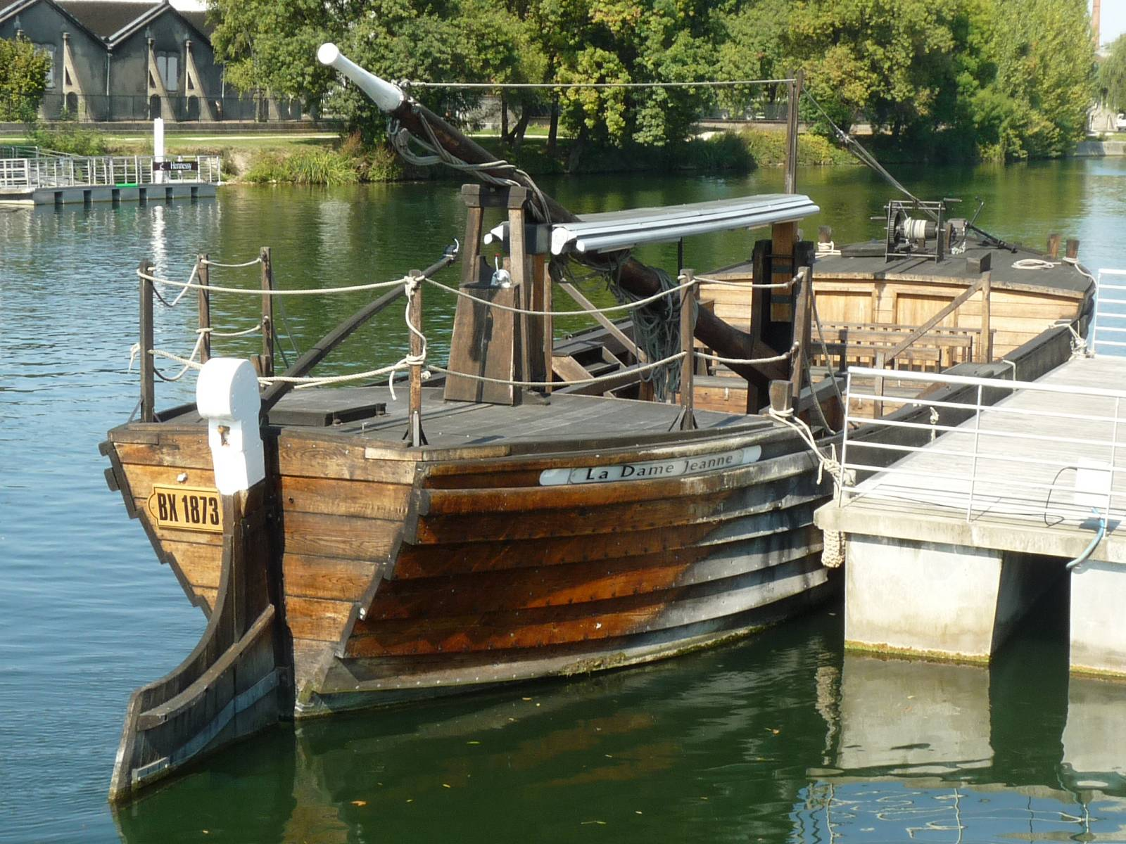 gabare Dame Jeanne sur la Charente au port de Cognac (16), France